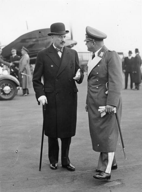 Scherl: General der Flieger Milch nach Paris eingeladen. Auf Einladung der französischen Regierung begab sich heute [4.10.1937] eine unter Führung des Staatssekretärs General der Flieger Milch stehende Abordnung von Fliegeroffizieren nach Paris, um dort die französische Luftwaffe kennen zu lernen. links: André Franzois-Poncet 12765-37